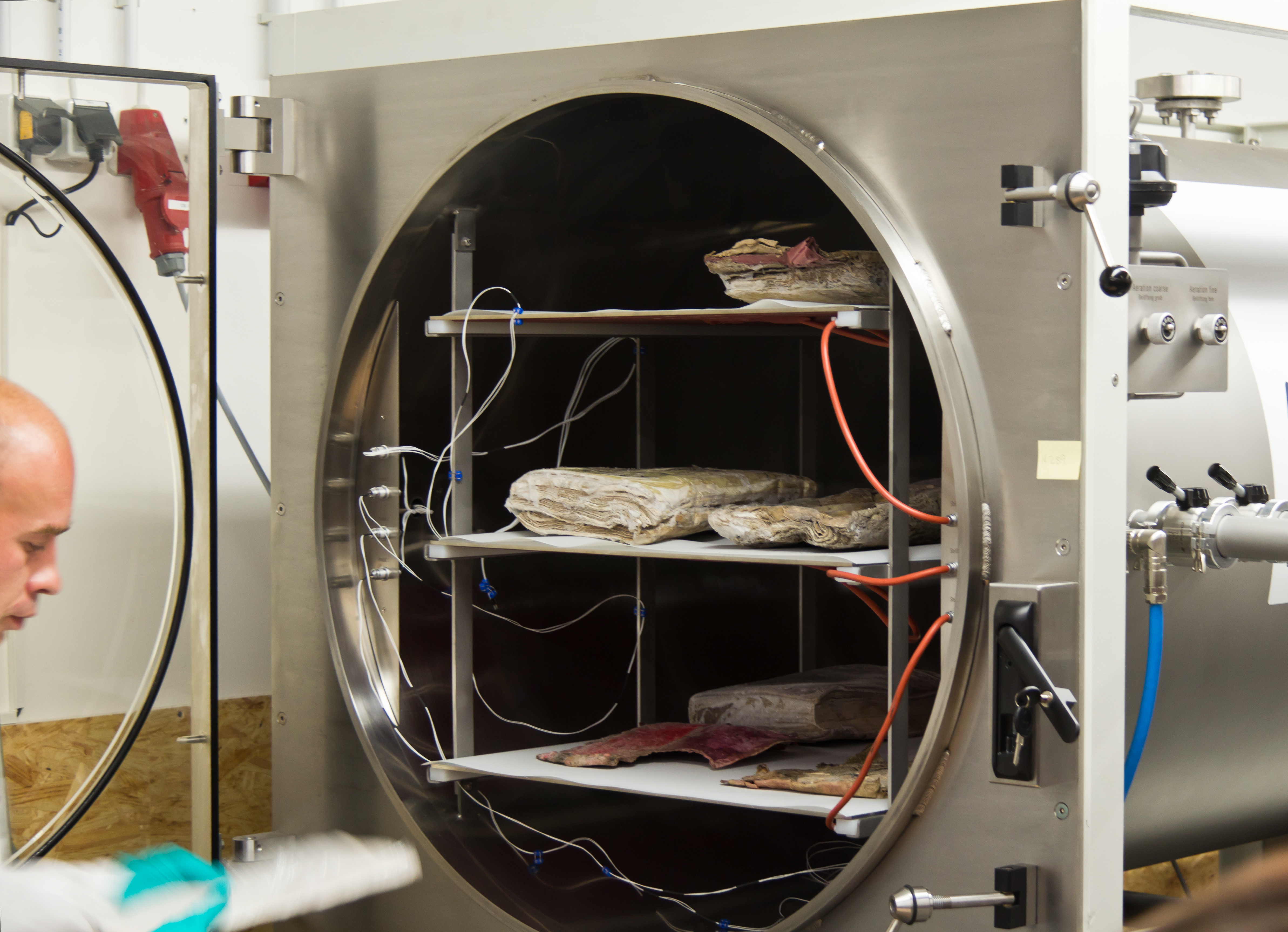 Pressetermin zur Inbetriebnahme der Gefriertrocknungsanlage im Restaurierungs- und Digitalisierungszentrum des Historischen Archivs der Stadt Köln. Die Gefriertrocknungsanlage wird mit schockgefrorenem Archivgut befüllt.